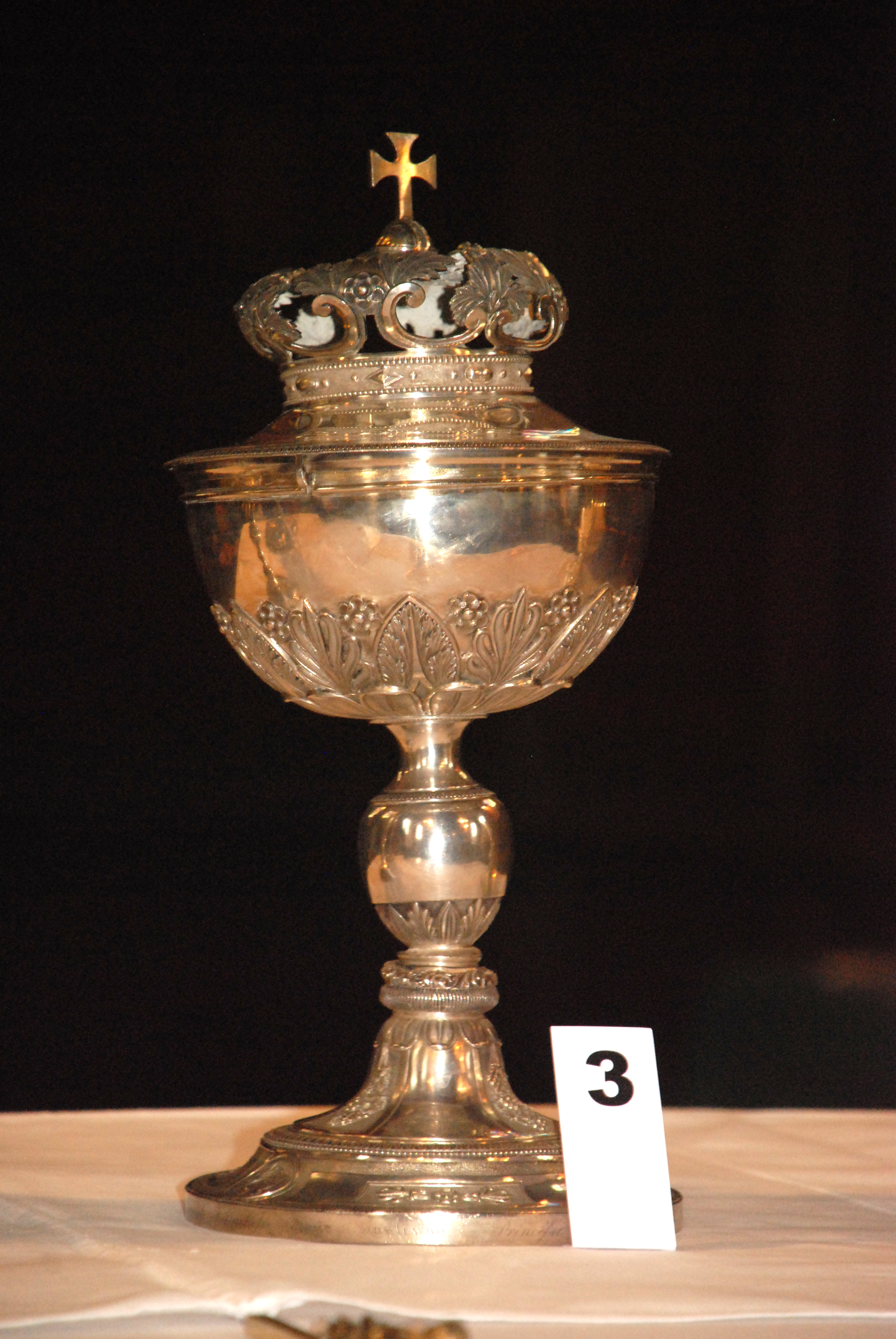 Belgique - Brabant wallon - Genappe - Baisy-Thy - Église Saint-Hubert - Ciboire offert en 1817 par Anna Pavlovna, grande-duchesse de Russie, princesse d'Orange et reine des Pays-Bas.